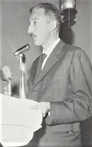 Giovanni Pirelli, vincitore del V Premio Teramo